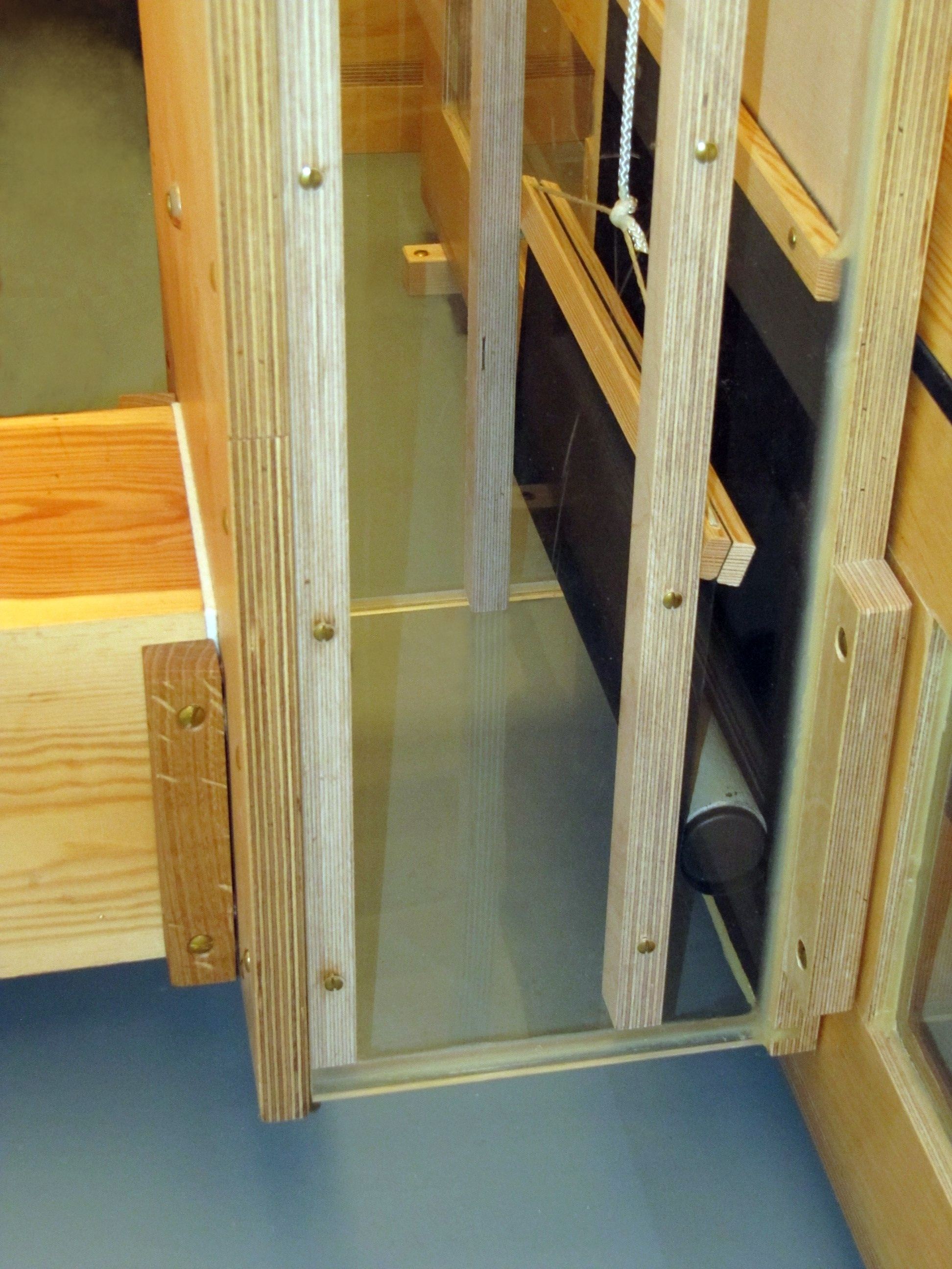 Rollventil zur Drosselung des Motorwindes einer Orgel; zu Demonstrationszwecken mit durchsichtigen Wänden.